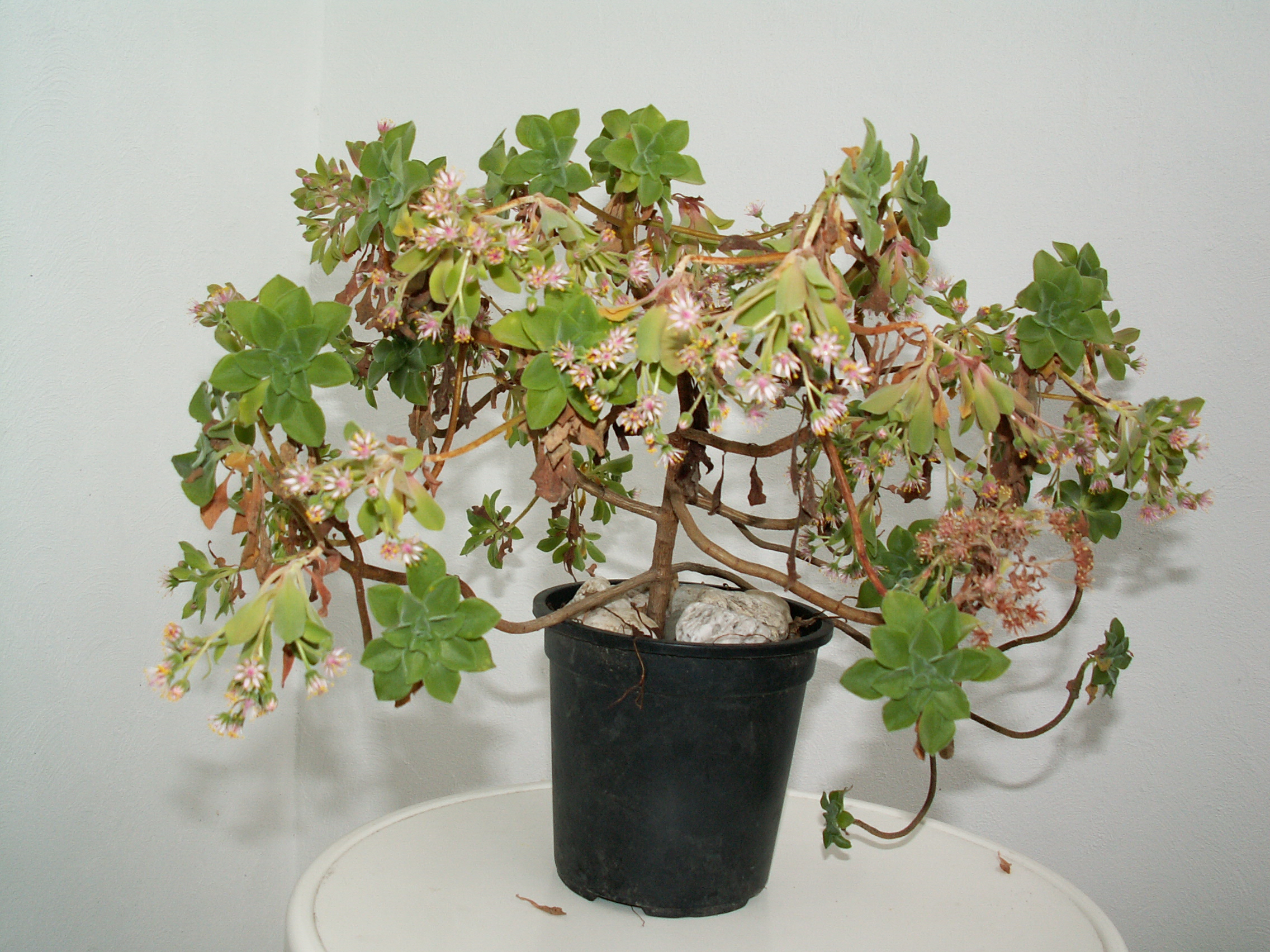 Aeonium goochiae